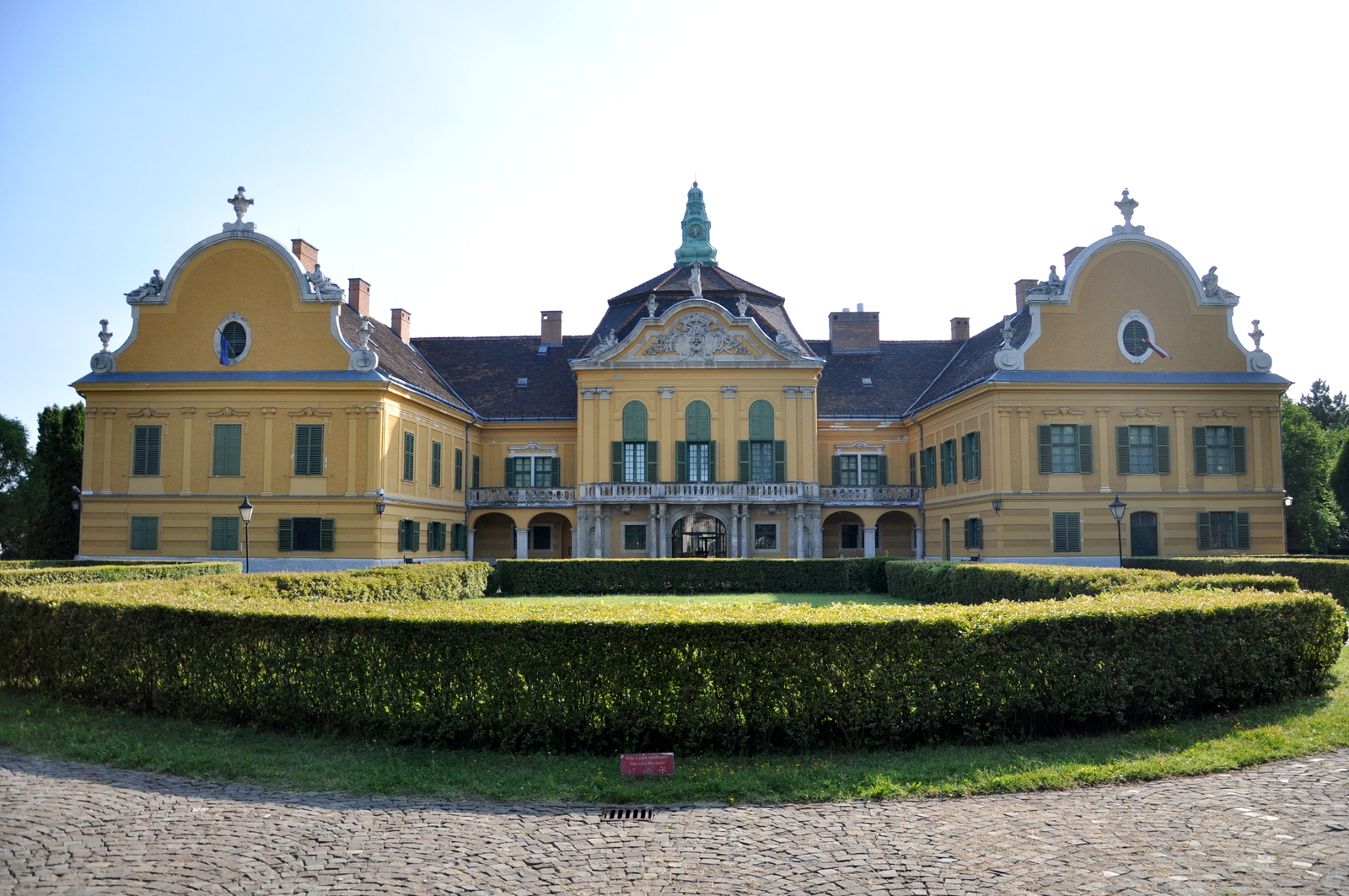 Száraz-Rudnyánszky-kastély This is a photo of a monument in Hungary, Identifier: 1296